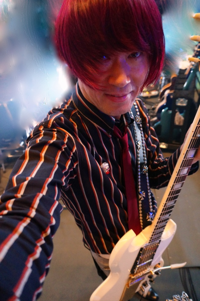 西川進の写真